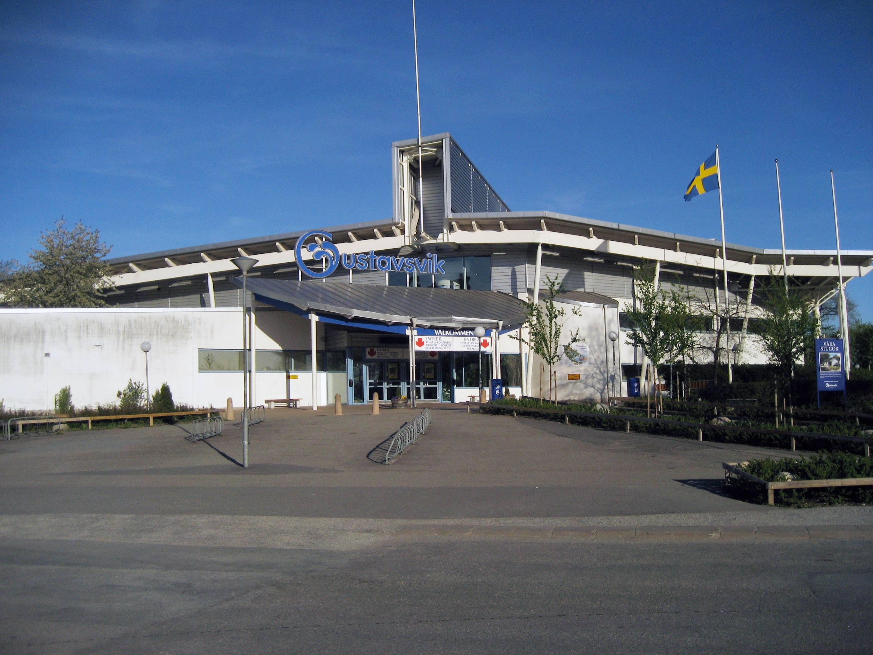 Gustavsvik of Örebro, Sweden